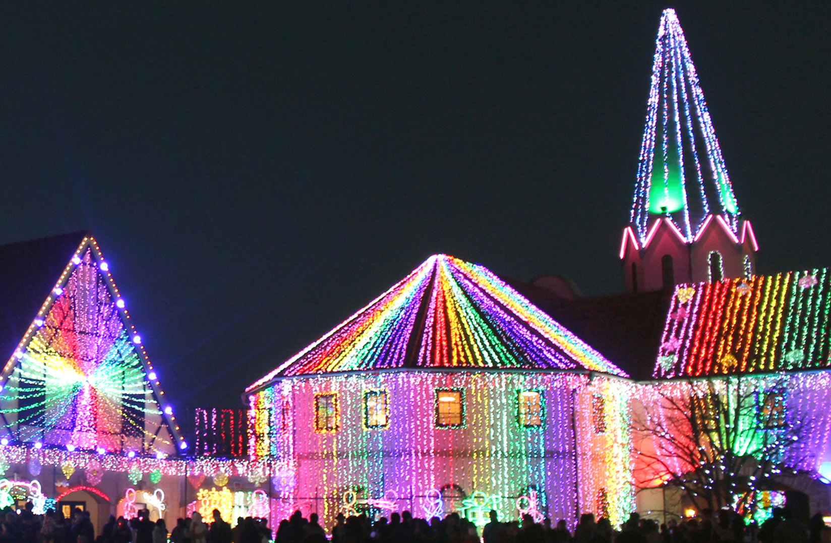 ドイツ村イルミネーション（2015年撮影）